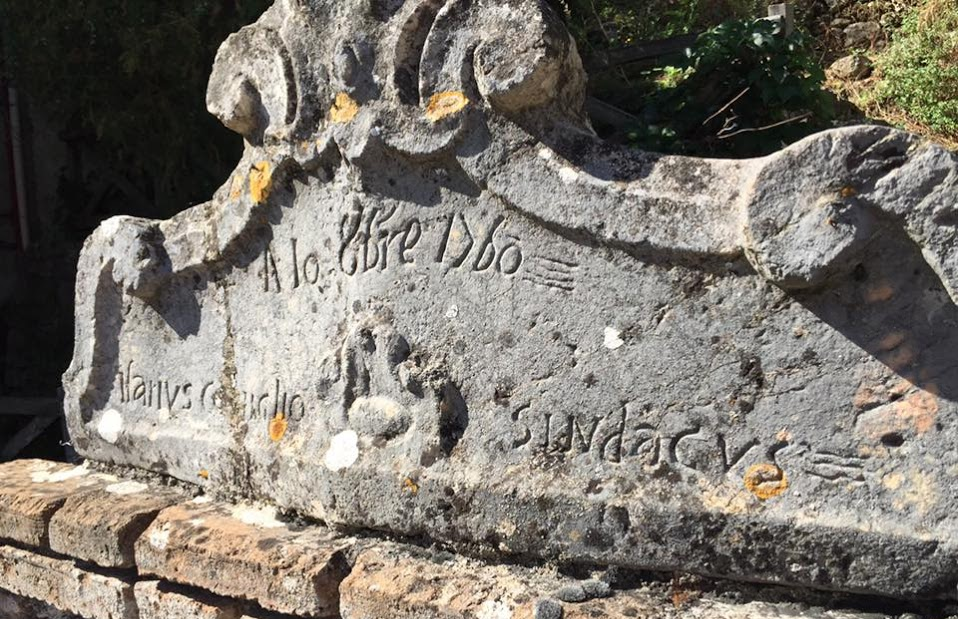 Cimasa della fontana vecchia di Pazzano (agosto 2016)